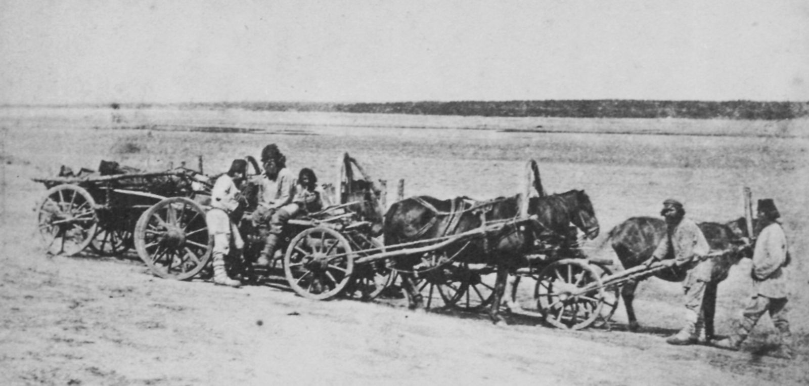 Carrick, William: Bauern auf dem Weg zum Markt von Kamenka